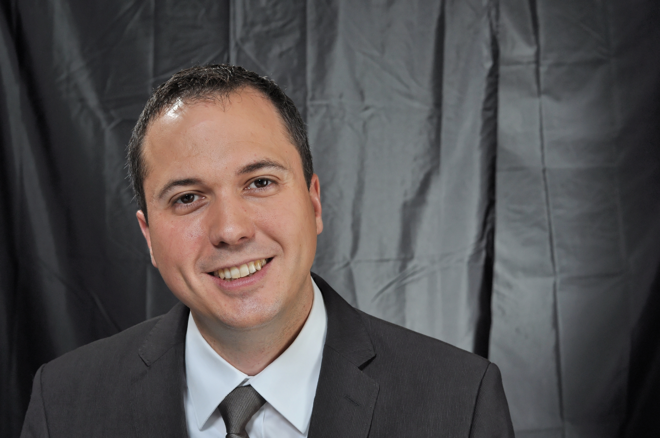 Andreas Deuschle 2013 Personality rights warningAlthough this work is freely licensed or in the public domain, the person(s) shown may have rights that legally restrict certain re-uses unless those depicted consent to such uses. In these cases, a model release or other evidence of consent could protect you from infringement claims.